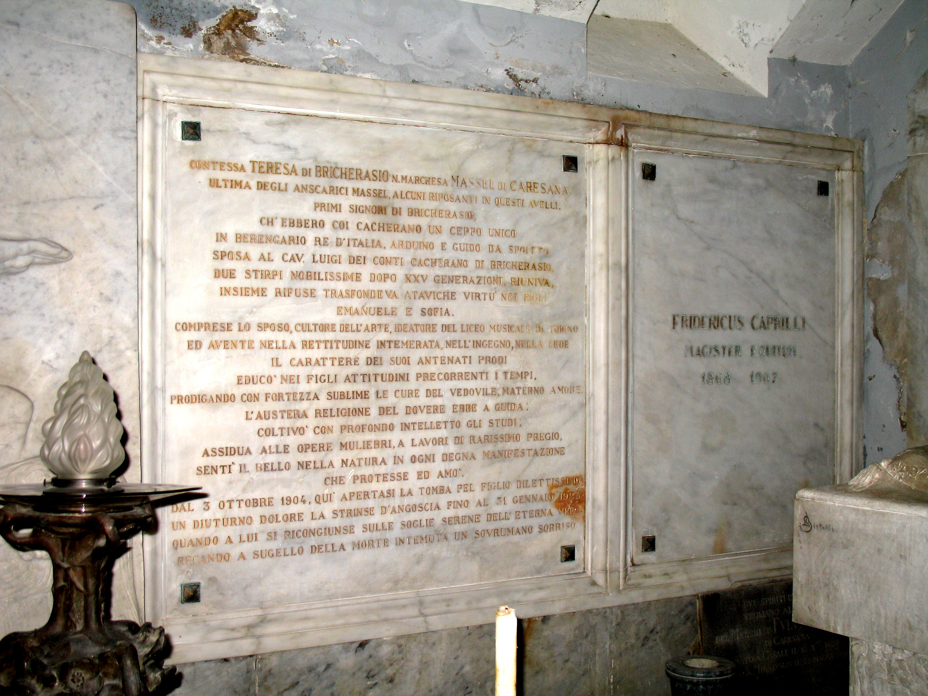 Cappella Bricherasio a Fubine, Alessandria, Italia. Lapidi con epigrafi funerarie della marchesa Teresa Massel di Caresana e del capitano Federico Caprilli (1868-1907)